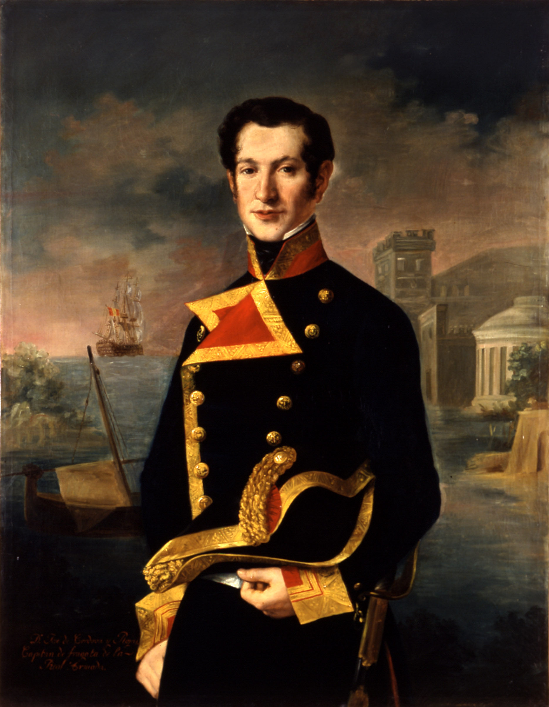 Retrato del marino español José de Córdova y Rojas (1774-1810), que llegó a ser capitán de fragata de la Real Armada Española y murió fusilado en diciembre de 1810 por formar parte de la contrarrevolución a la Revolución de Mayo del Virreinato del Río de la Plata y oponerse a la independencia de esa zona.